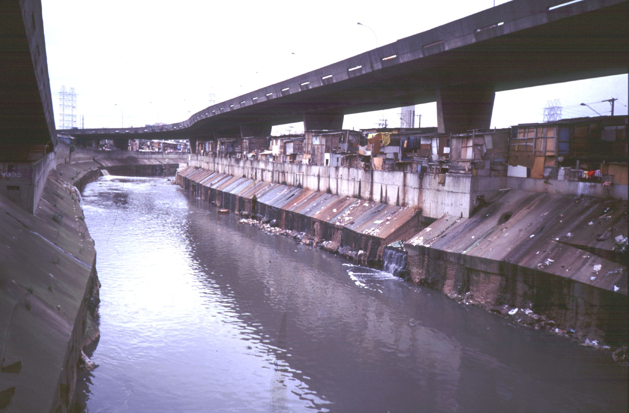 Favela under highway. São Paulo, Brazil.